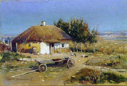 Раевская-Иванова, Мария Дмитриевна (1840-1912). Сельский пейзаж